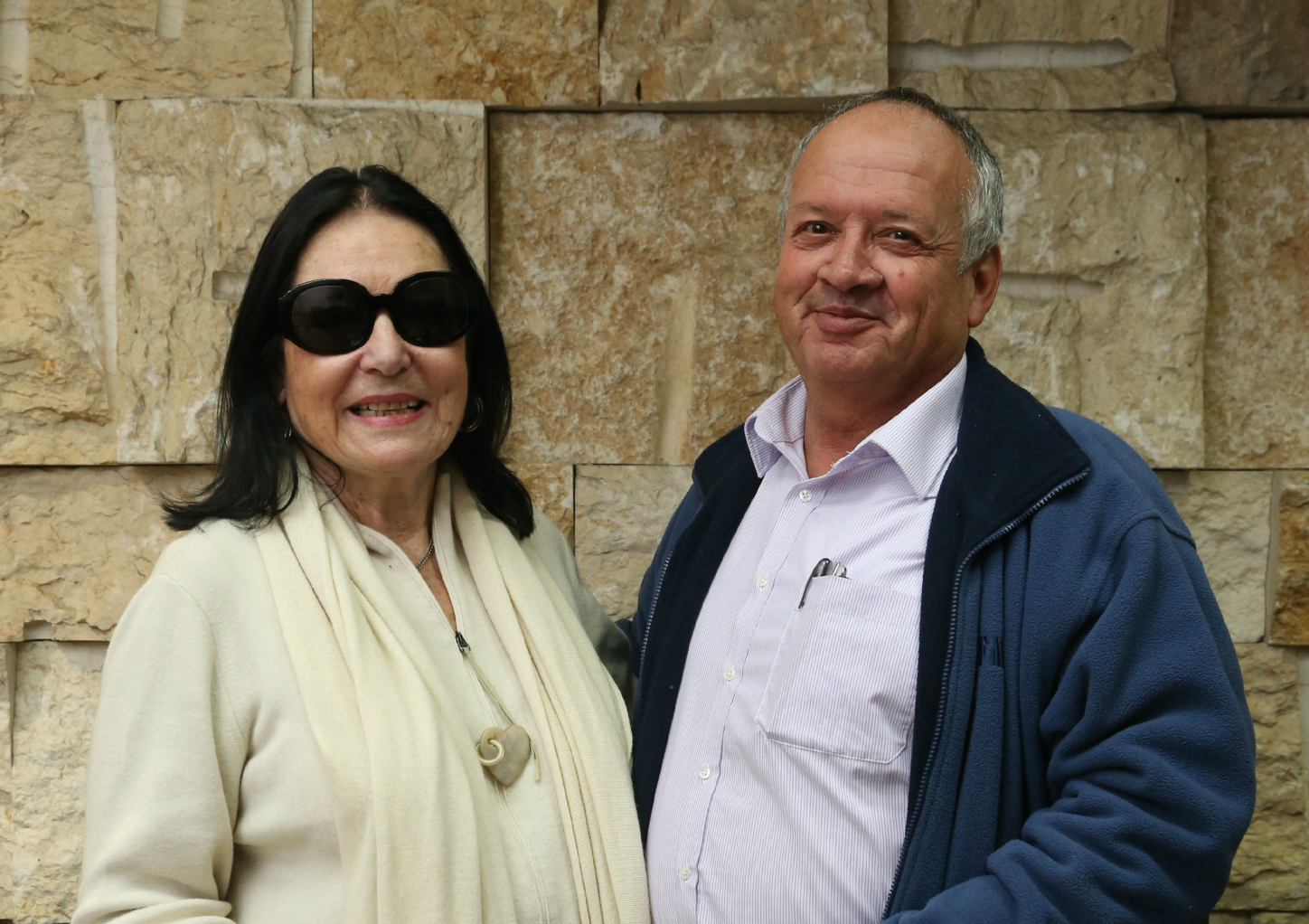 בני דודקביץ' עם ננה מושקורי